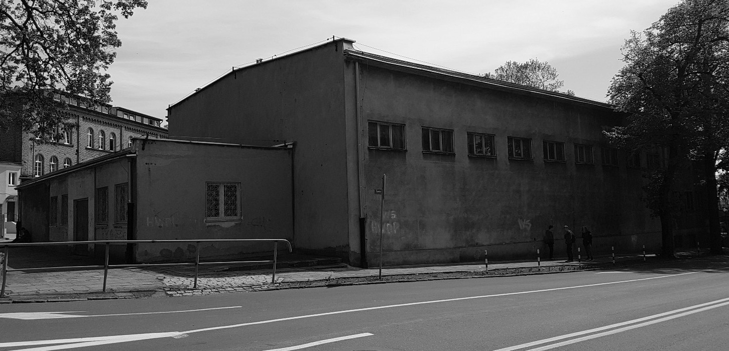 Stargard. Sala gimnastyczna Szkoły Podstawowej nr 1 od ul. Śląskiej (2017)